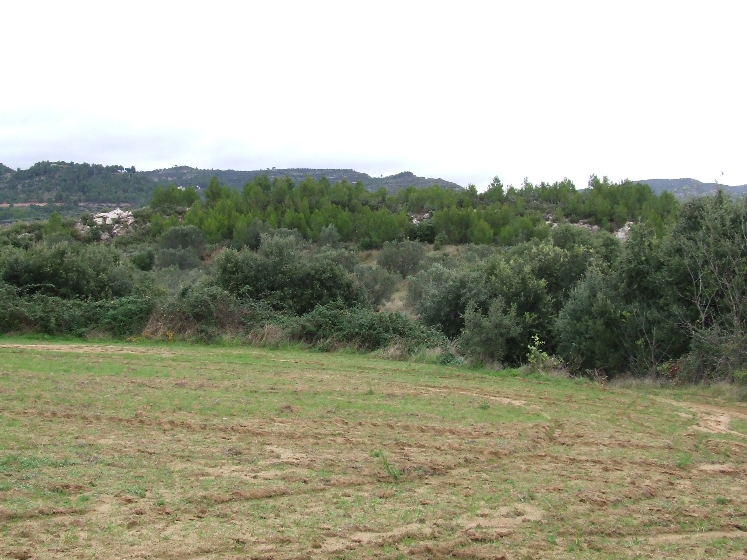 Els Turons d'en Xifreda i d'en Rossic (Riells del Fai, Bigues i Riells, Vallès Oriental)